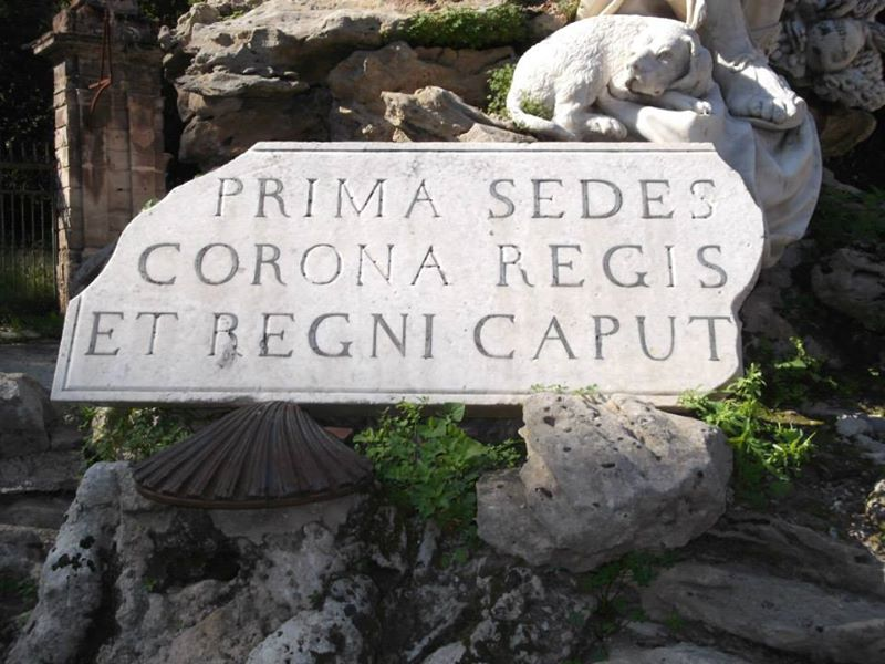 Motto che ricorda le tre prerogative regali di Palermo. Fontana del Genio di Palermo, Villa Giulia